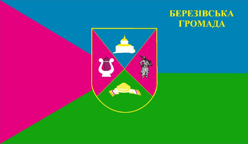 Прапор Березівської сільської громади Глухівського району